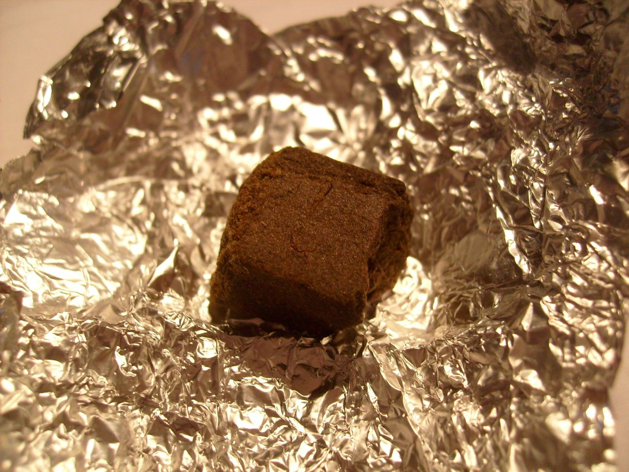 Résine de cannabis commerciale vendue en france, représente 10€ de valeur marchande.